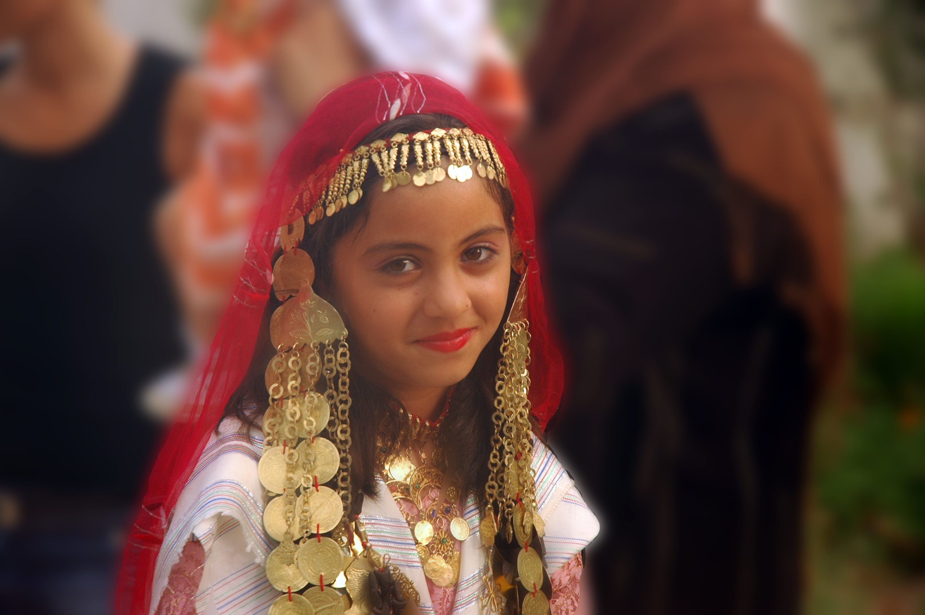 Petite fille participant à la henna s'ghira, fête d'un mariage traditionnel à Djerba (Tunisie)